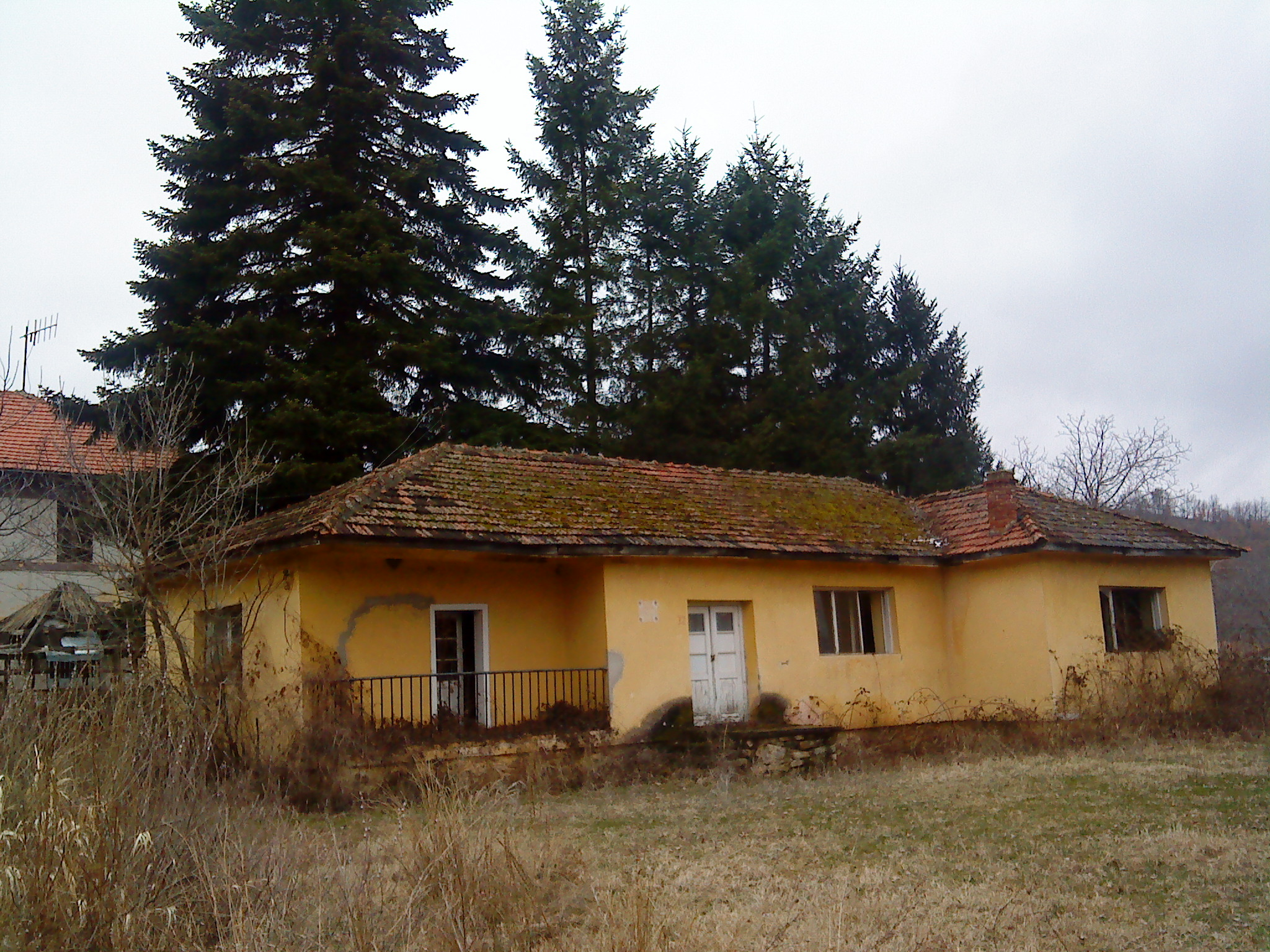 с.Кажани, зграда на поранешната Амбуланта во селото